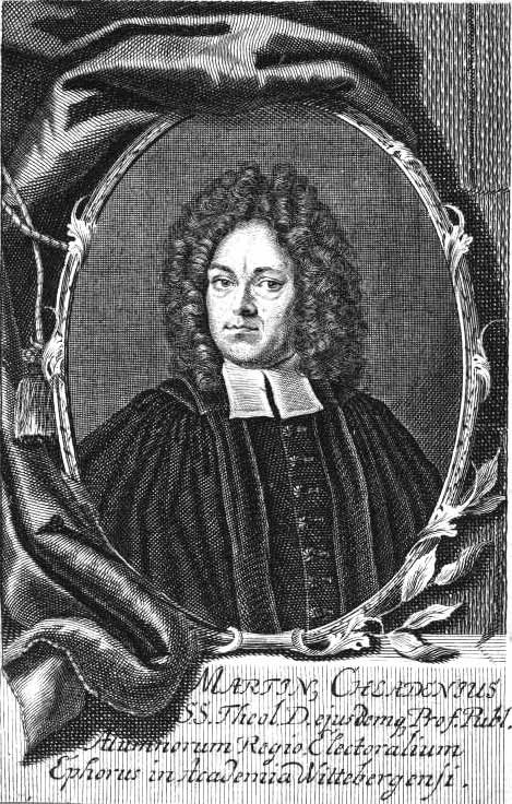 Martin Chladni, auch Chladen, Chladenius, Chladenio (1669-1725), ungarischer lutherischer Theologe